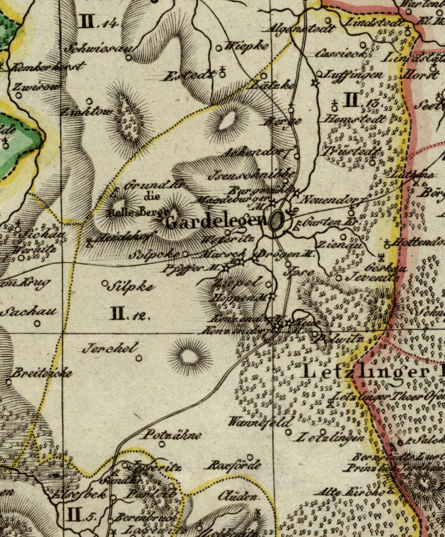 Der Kanton Gardelegen und der Landkanton Gardelegen (hier nicht getrennt) im Distrikt Salzwedel des Departement der Elbe (Königreich Westphalen) von 1812